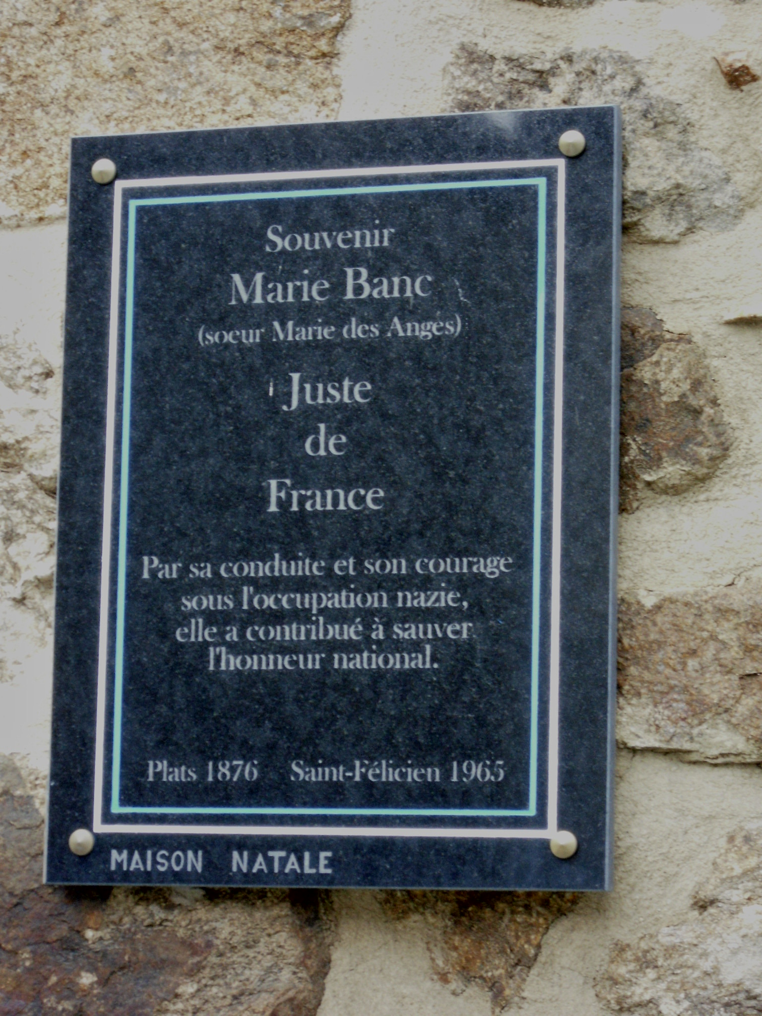 Plaque commémorative : Marie-France Banc